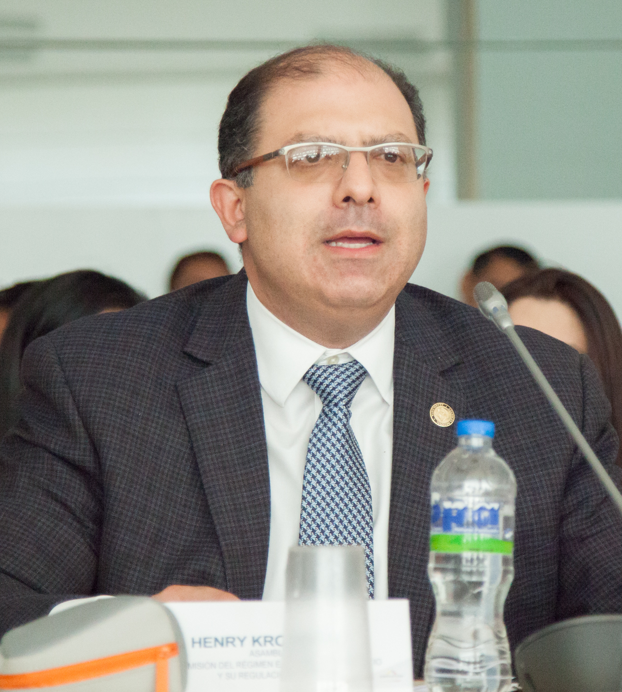 Tema: Comisiones Generales sobre Proyectos de Ley Orgánica para impulsar la reactivación económica del Ecuador. Fotografía: Sayana Palomeque / Asamblea Nacional